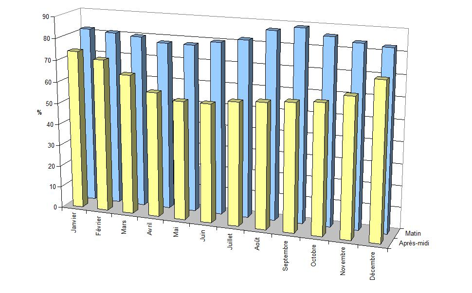 Hygrométrie mensuelle moyenne à Hartford (Michigan, Etats-Unis).